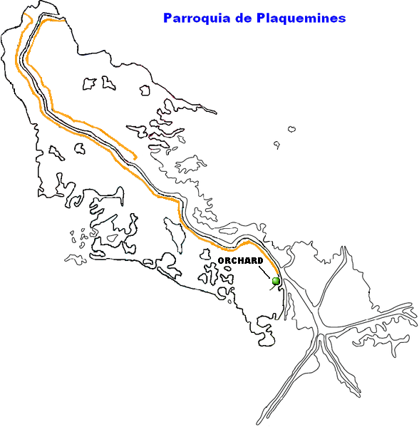 Orchard, Louisiana.